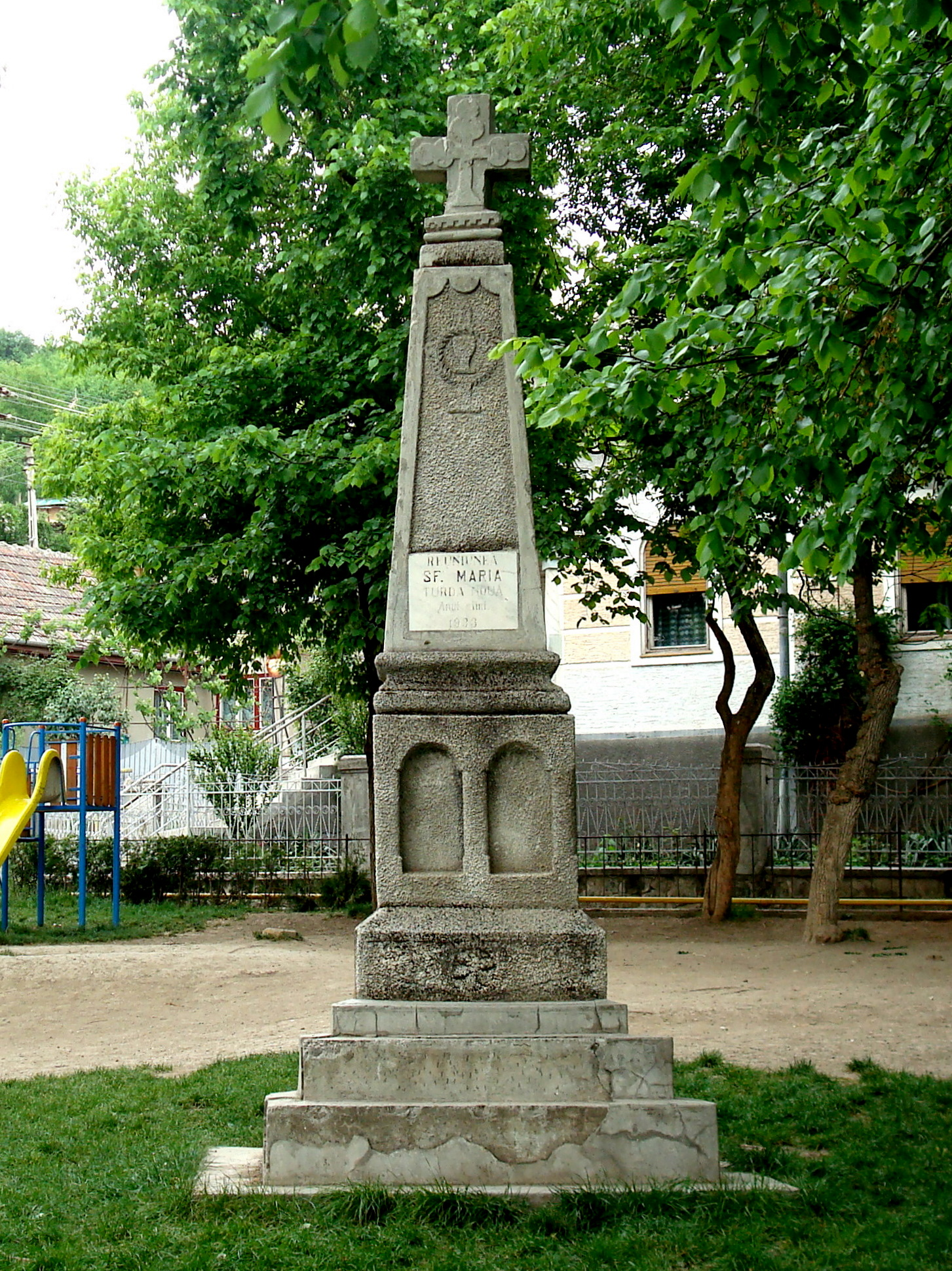 Turda - Monumentul Reuniunea Sf.Maria (str.Avram Iancu)